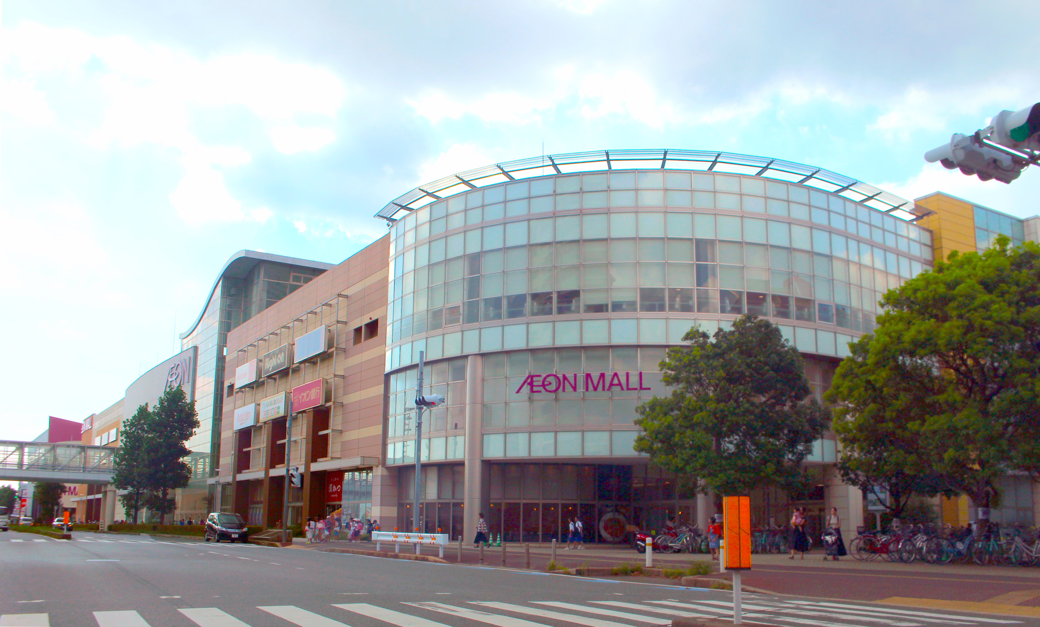 AEON Mall Chiba Newtown